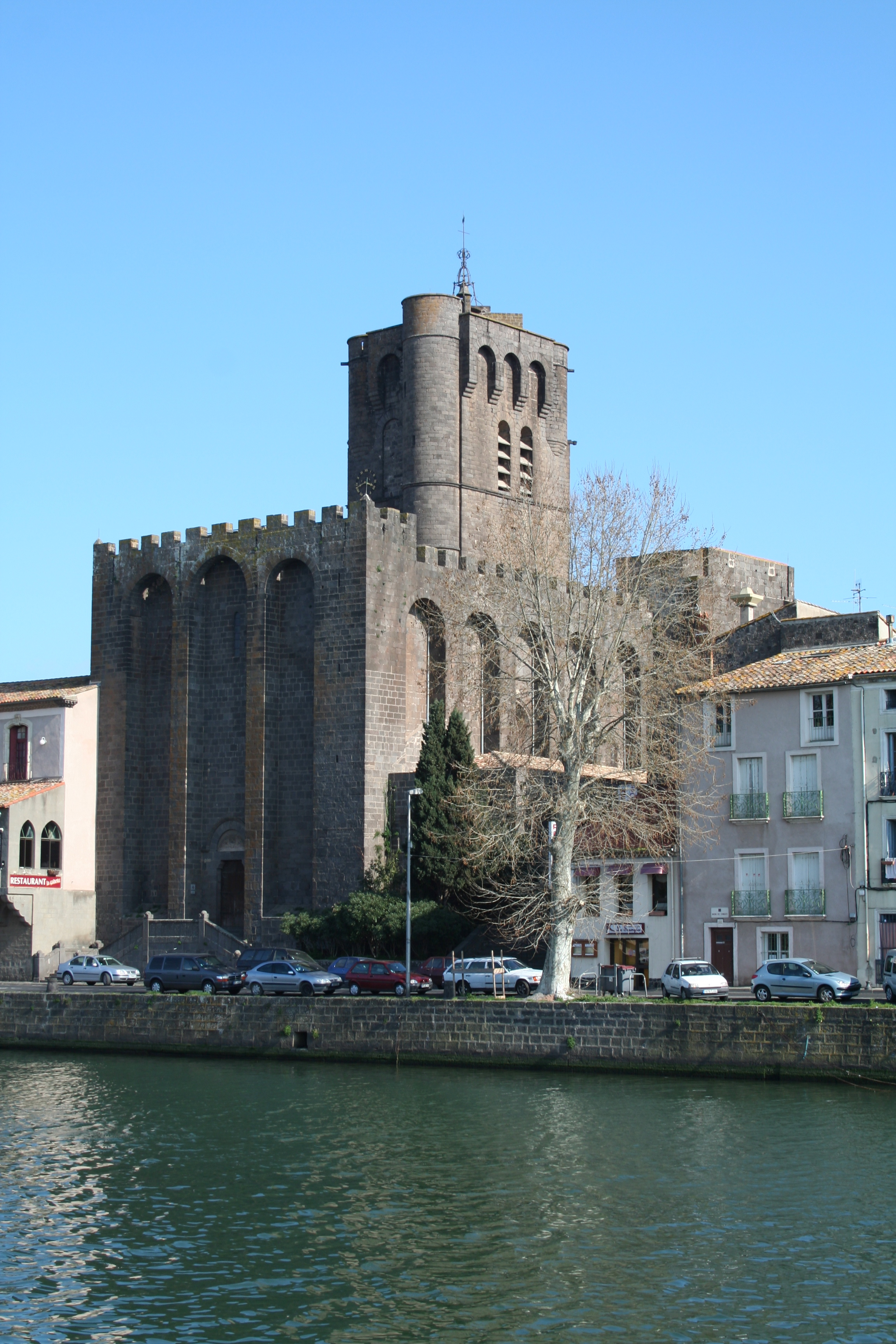 Agde (Hérault) - cathédrale Saint-Étienne - au premier plan, l'Hérault.